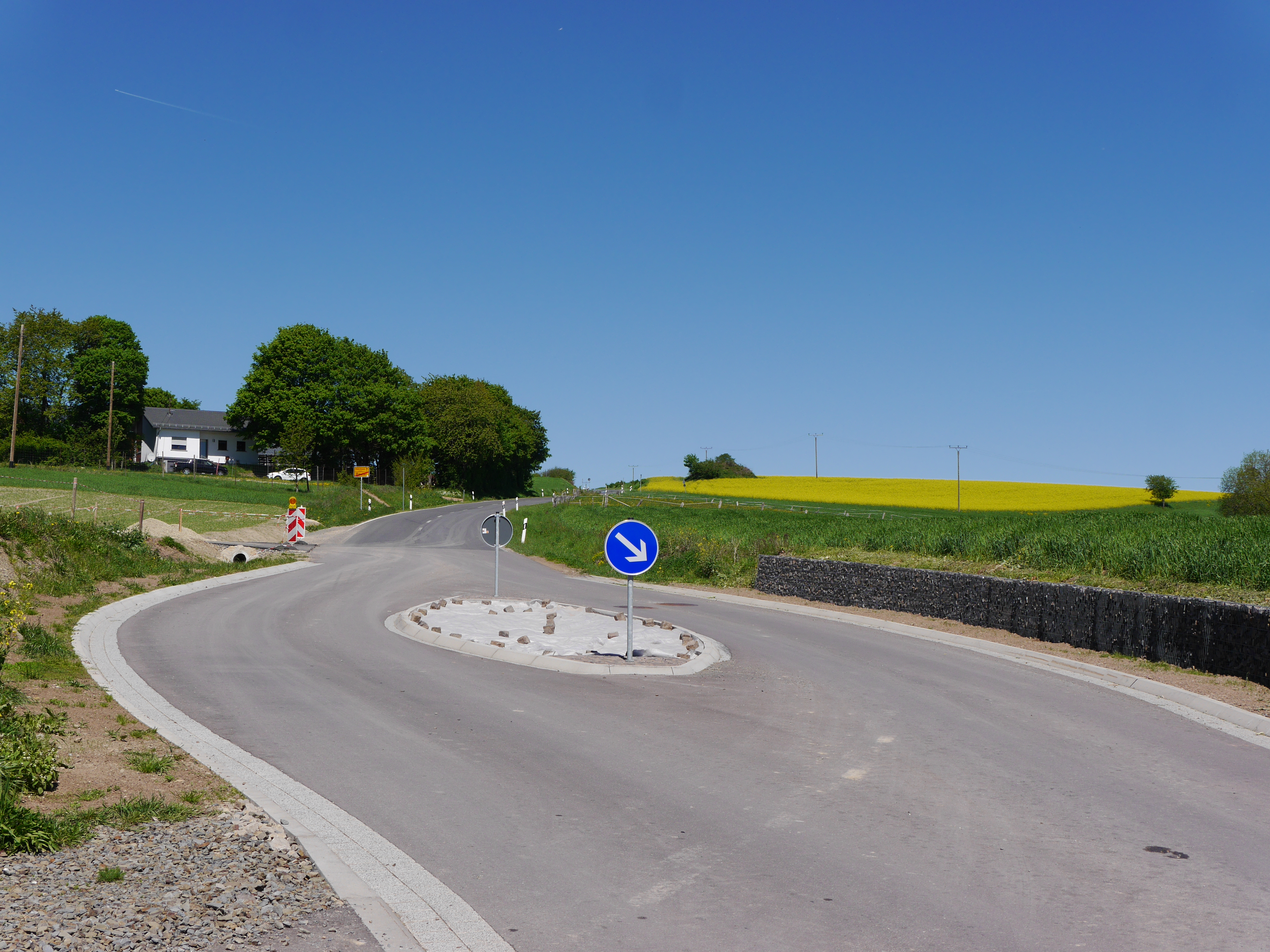 Bauler im Eifelkreis Bitburg-Prüm, Rheinland-Pfalz; Kammerwaldstraße (L1) am Ortsausgang in Richtung Norden (Rodershausen)